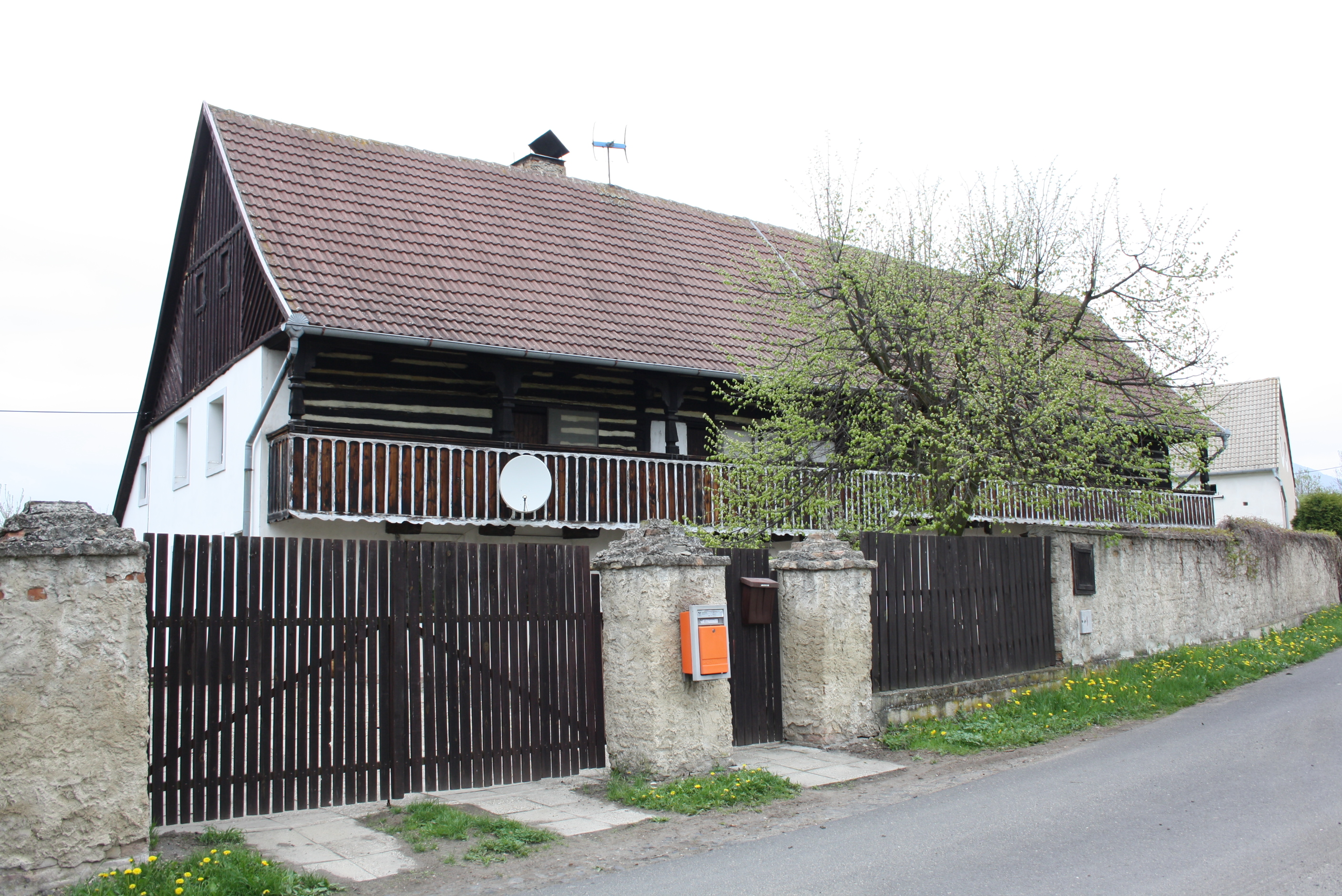 Dům číslo popisné 4 v Dolních Řepčicích, části Liběšic.